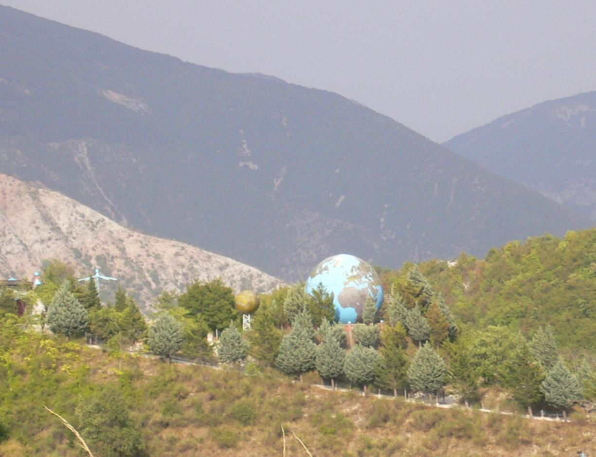 globo terracqueo della pace - apecchio (loc colombara), PU ,Italy